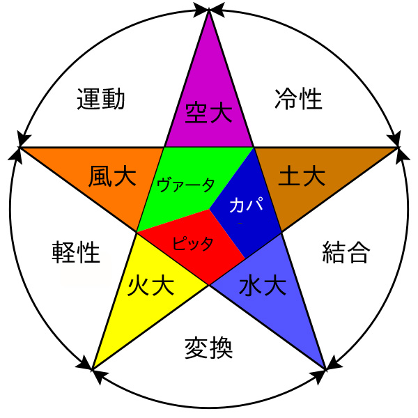 アーユルヴェーダにおけるトリ・ドーシャと五大の関係（英語版の画像の翻訳）。使用された色は恣意的なものである。